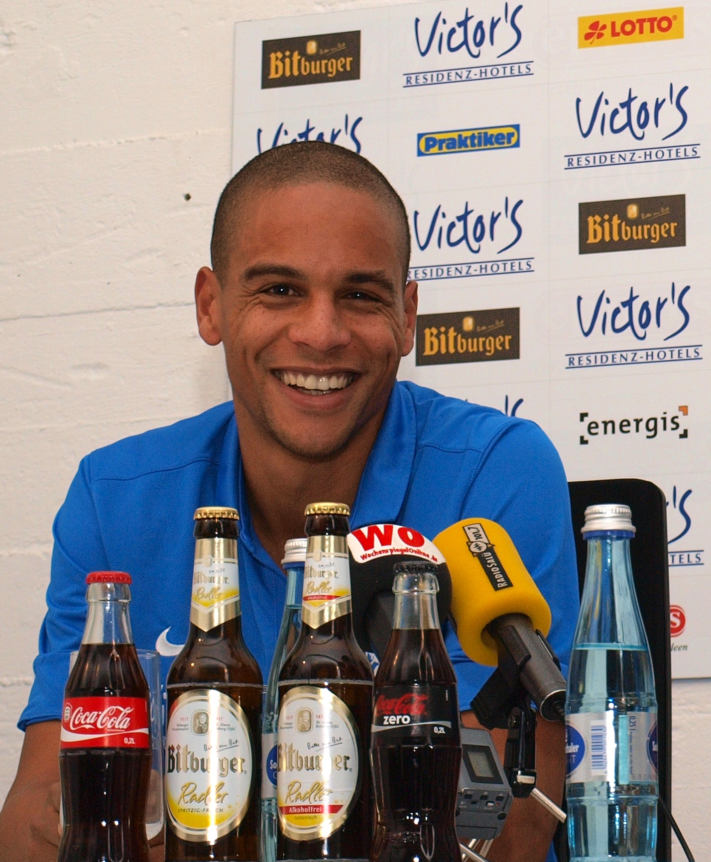 Marc Lerandy steht auf einer Pressekonferenz des 1.FC Saarbrücken den versammelten Journalisten Rede und Antwort.